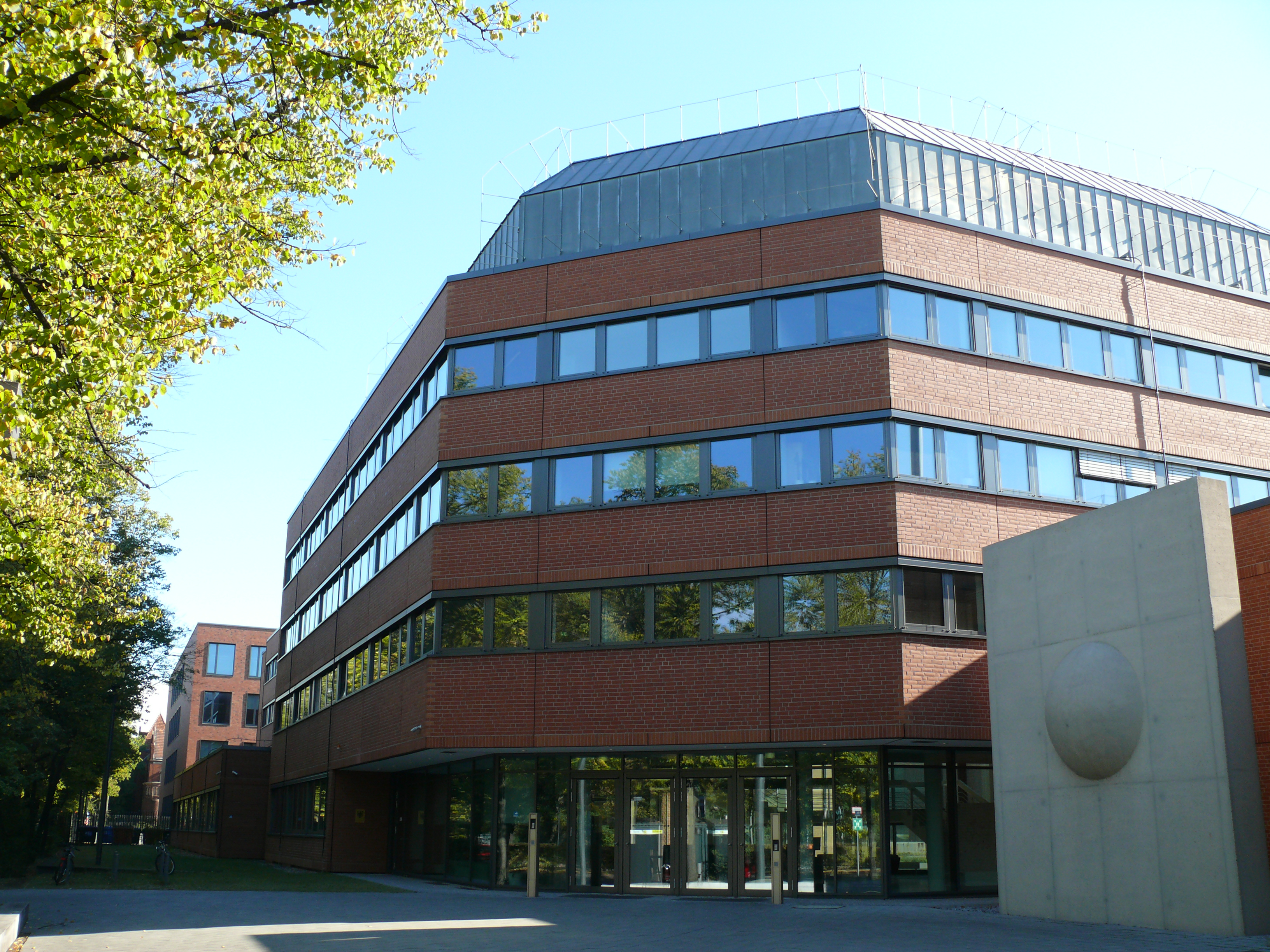 Wedding Seestraße 10 Robert Koch-Institut